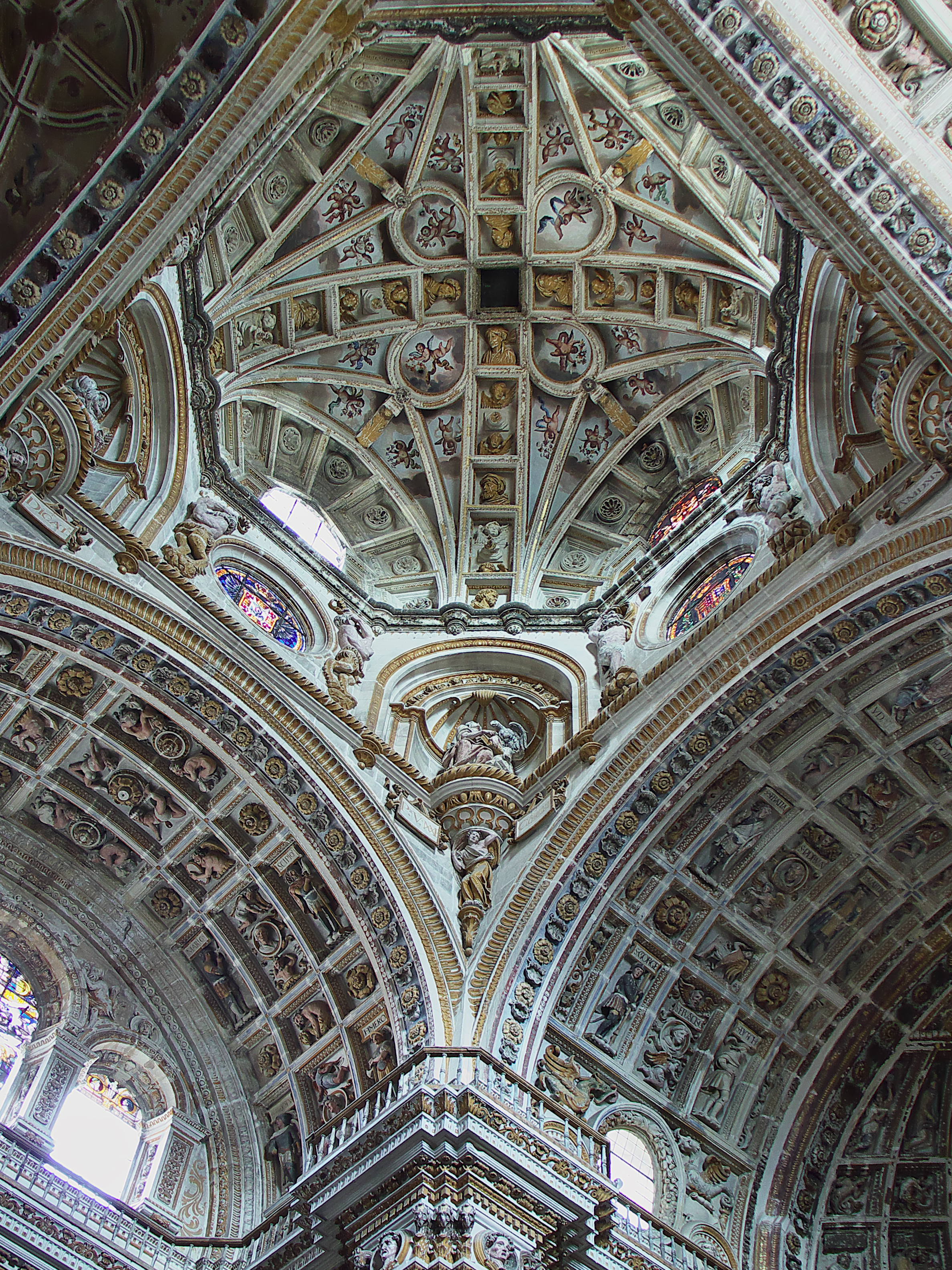 Iglesia del monasterio. Bóveda del crucero, obra de Diego de Siloé, activo en San Jerónimo desde 1528 hasta 1543, con bóvedas de medio cañón y casetones con altorrelieves de héroes bíblicos y de la antigüedad.